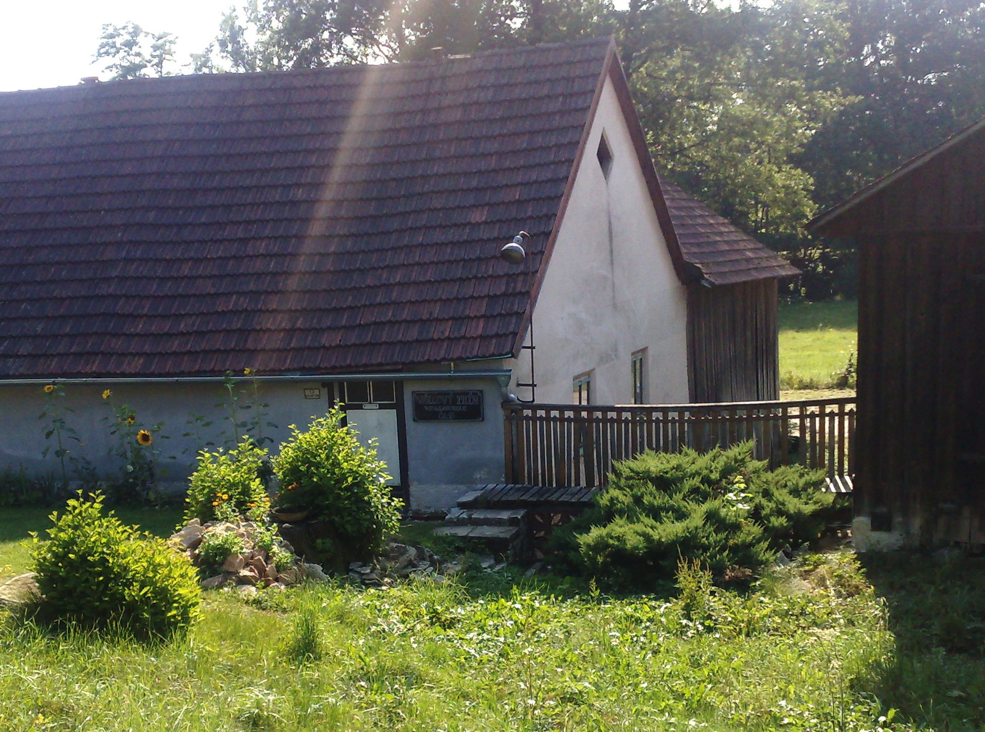 Pohled na mlýn před rekonstrukcí a opravou.